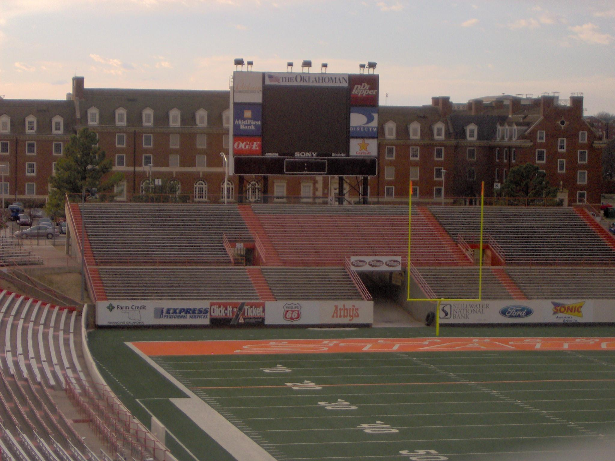 Inside Boone Pickens Stadium